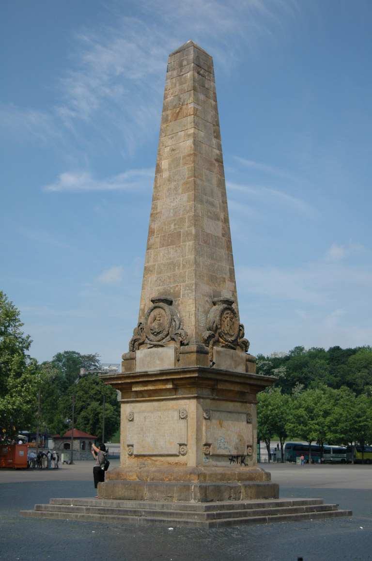 Obelisk (errichtet 1777) zum Gedenken an den kurmainzischen Erzbischof Friedrich Karl von Erthal